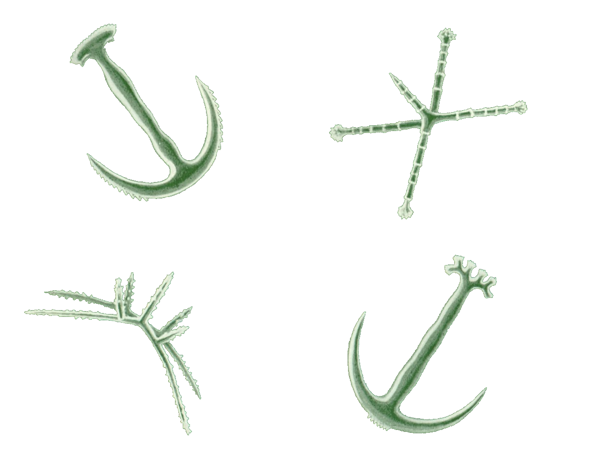 Sclerites of holothurians